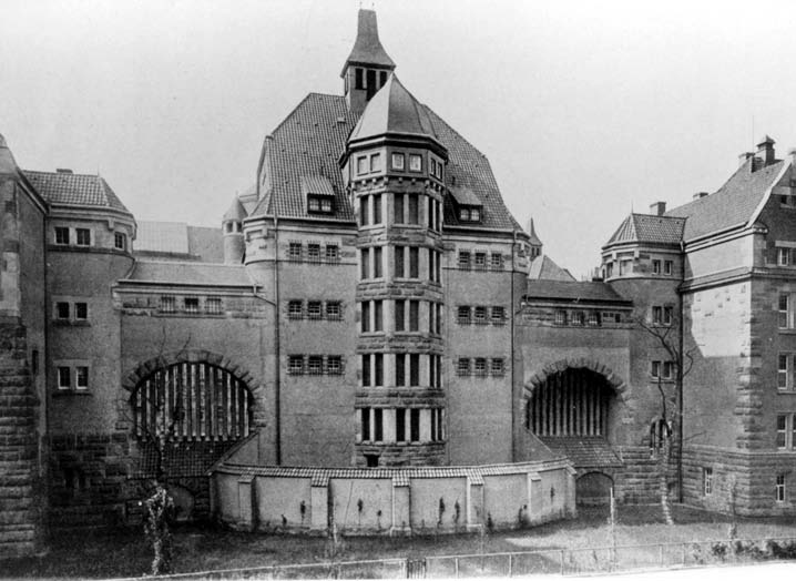 Königliches Landgericht Dresden mit angeschlossener Haftanstalt